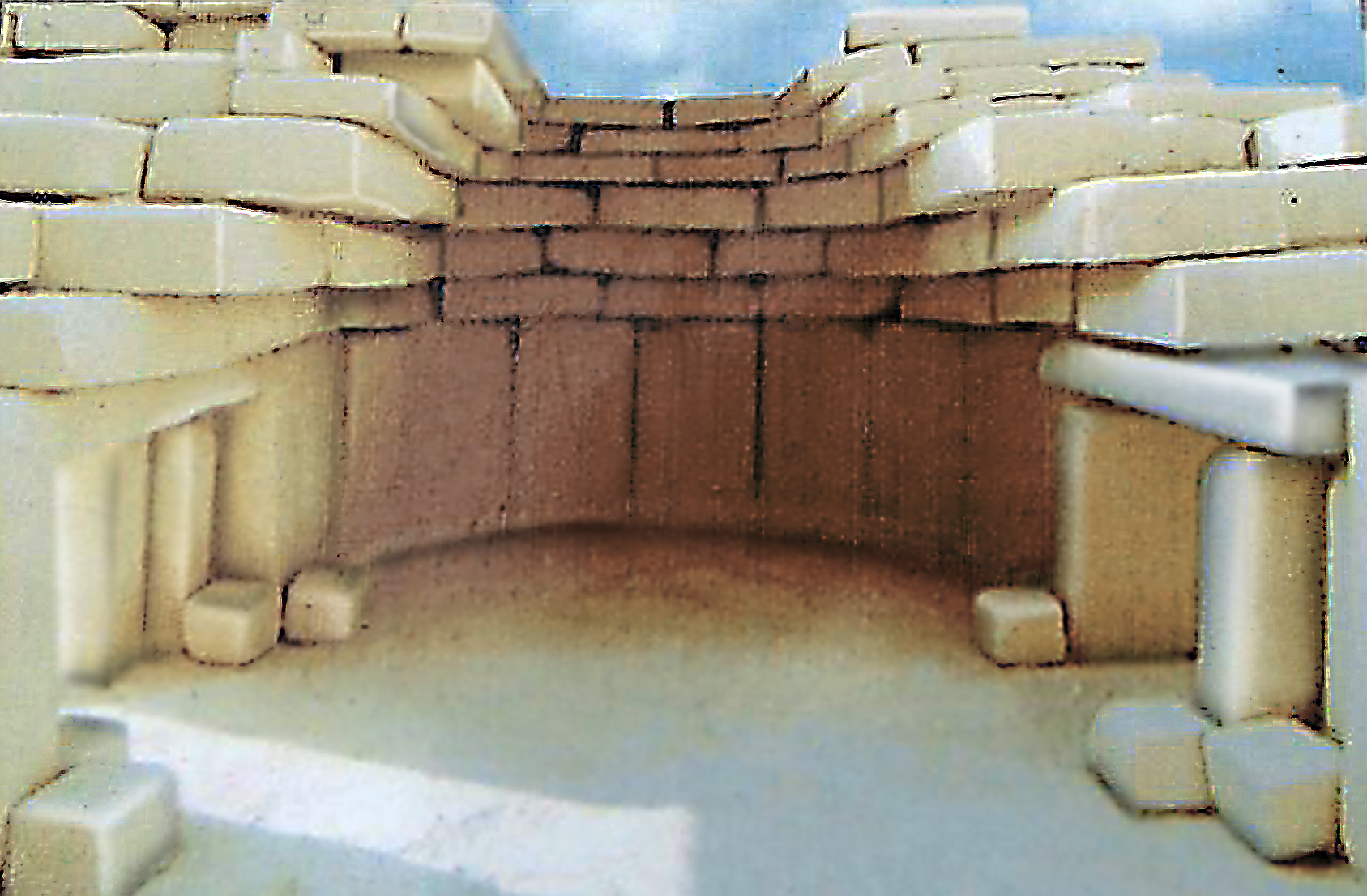 Tentative de restitution de la couverture des temples maltais